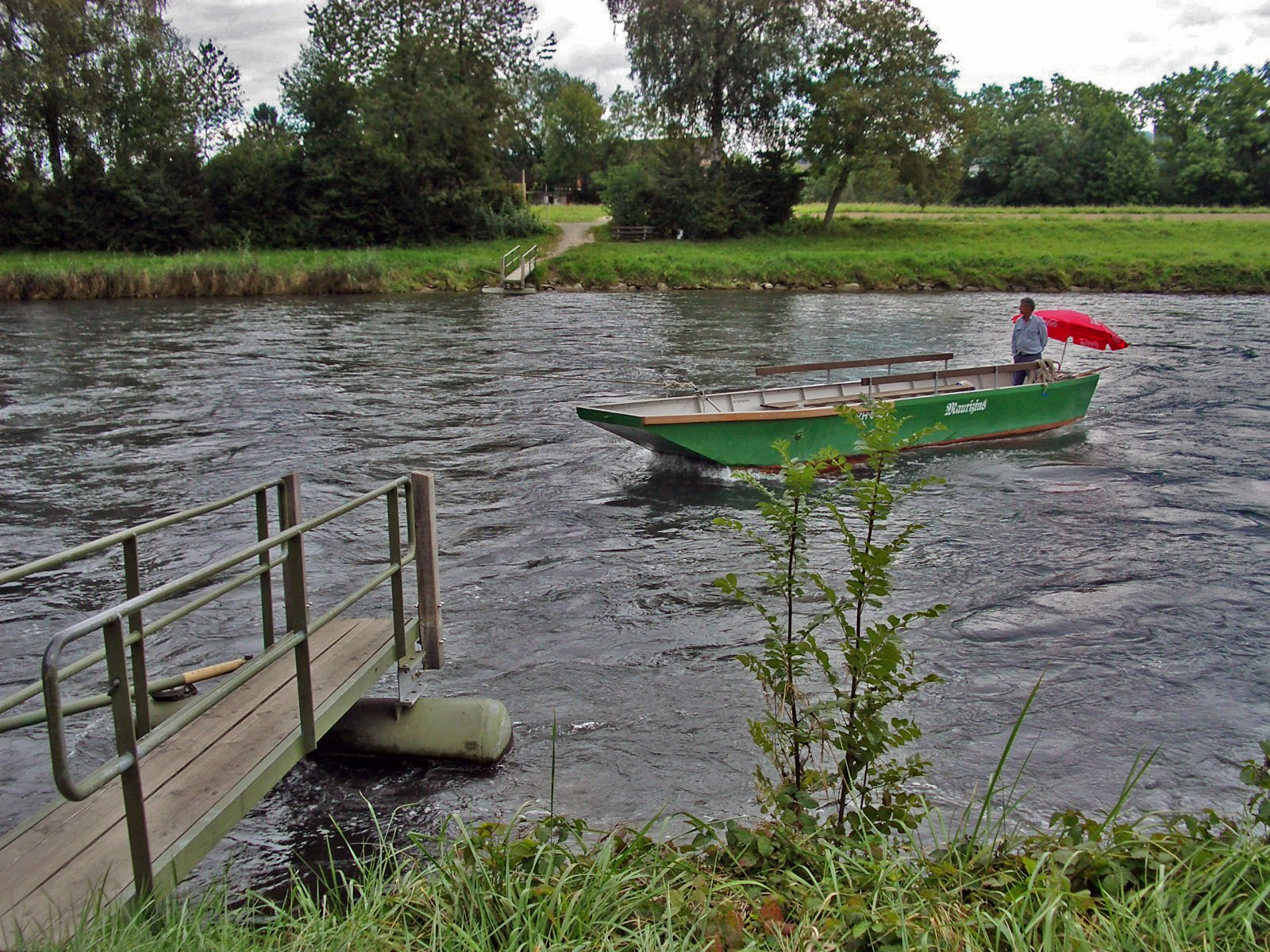 Fähre, Kloster Fahr, Schweiz